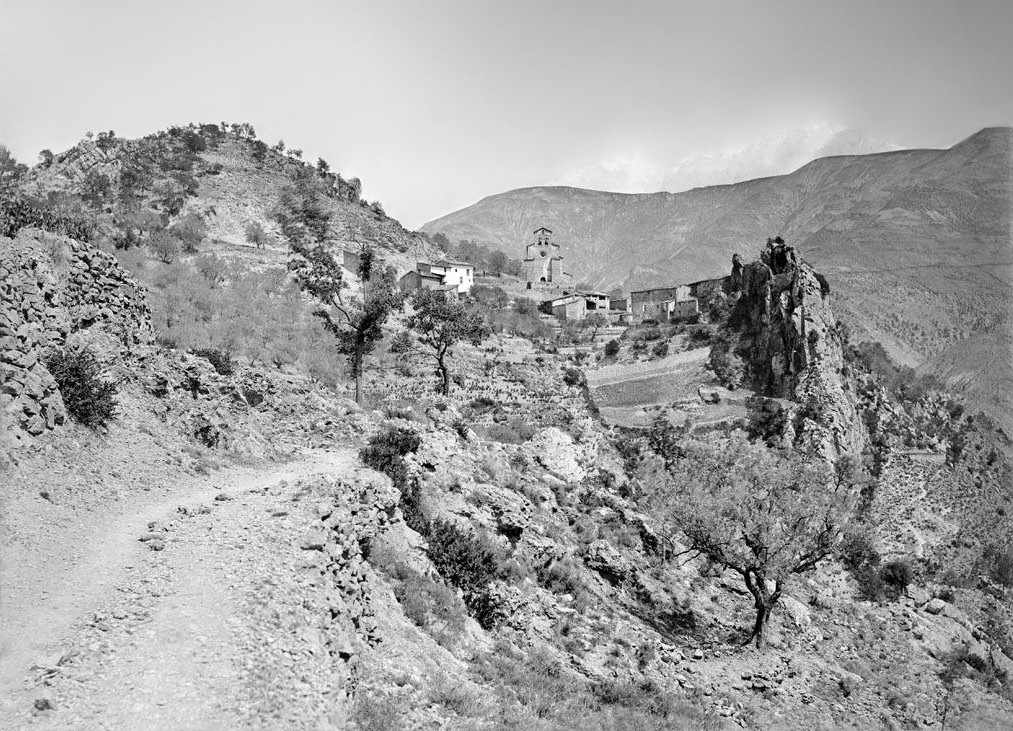 Imatge